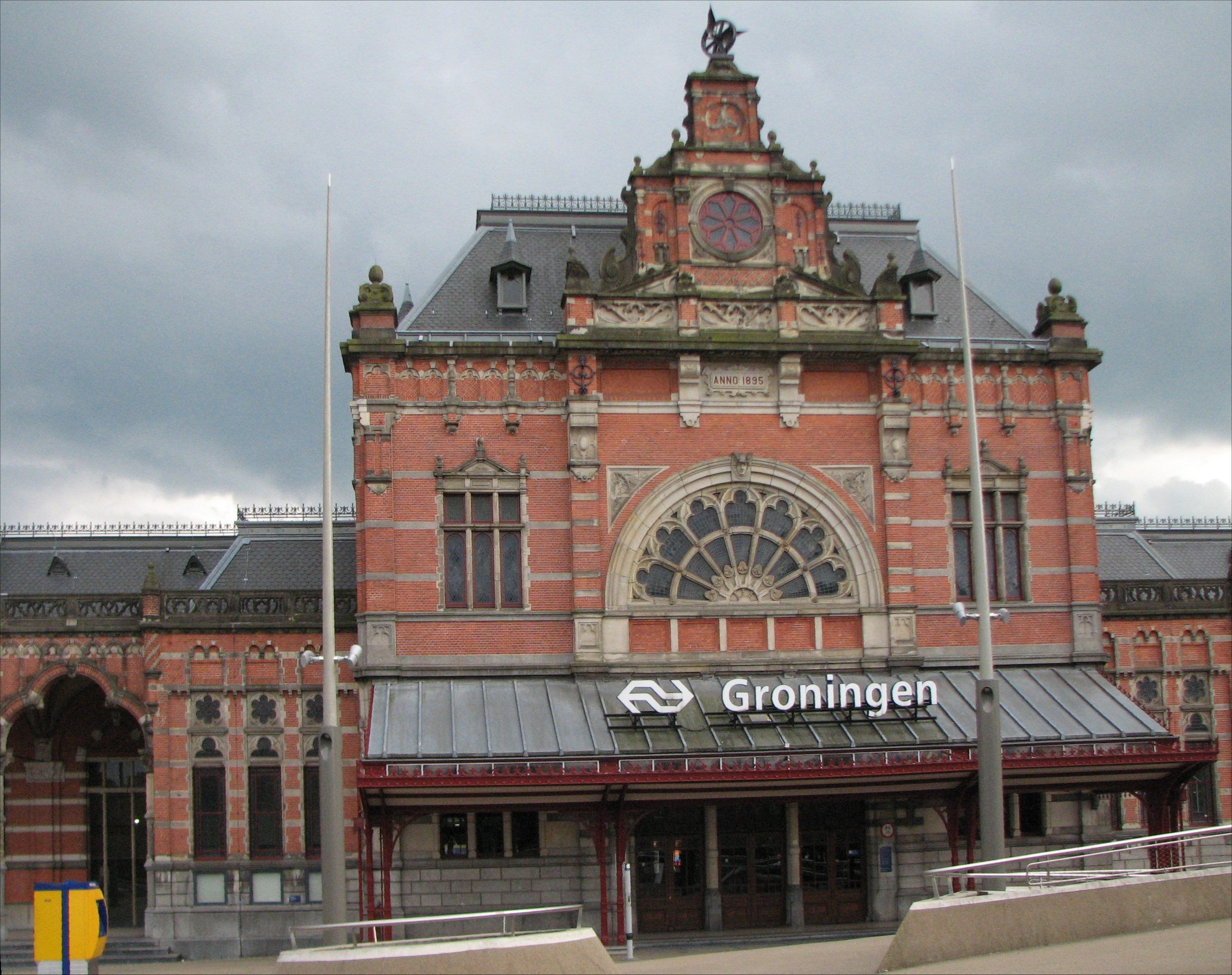 Hovedjernbanestasjonen i Groningen